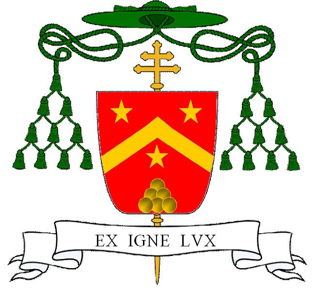 Escudo del Arzobispo Justo Mullor García